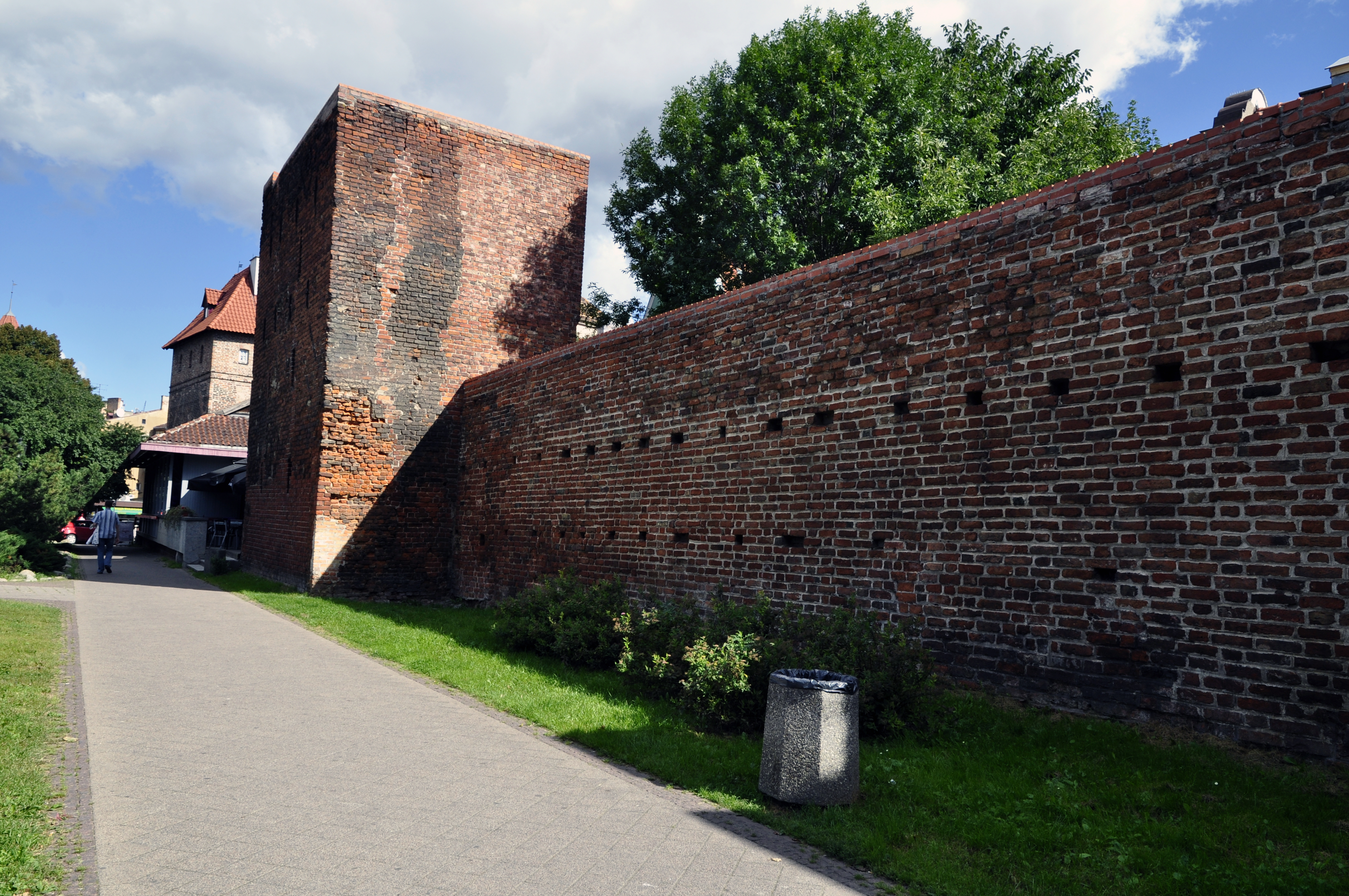 Gdańsk - mury obronne Głównego Miasta Gdańska (zabytek nr. rejestr. 135)